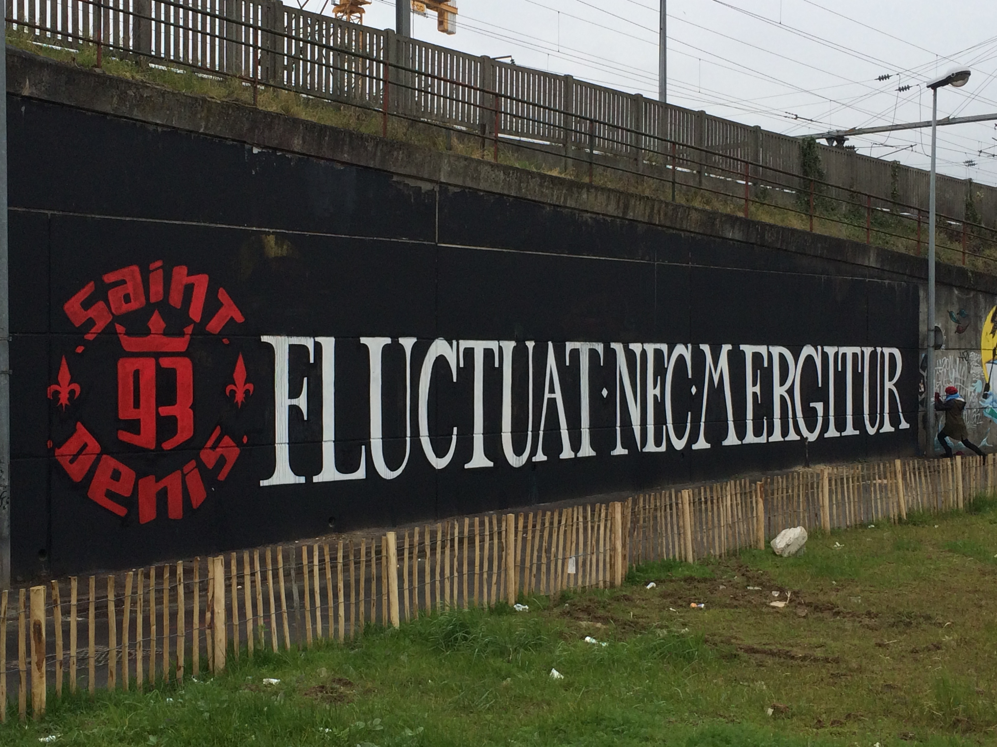 Un mur peint "Fluctuat nec mergitur" et "Saint-Denis 93" en janvier 2016 après les attentats du 13 novembre 2015 à Paris et à Saint-Denis.